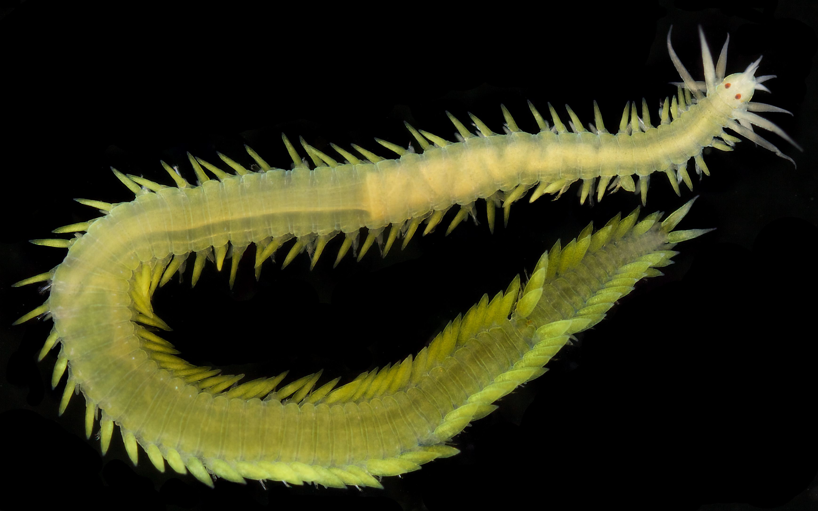 Eulalia viridis